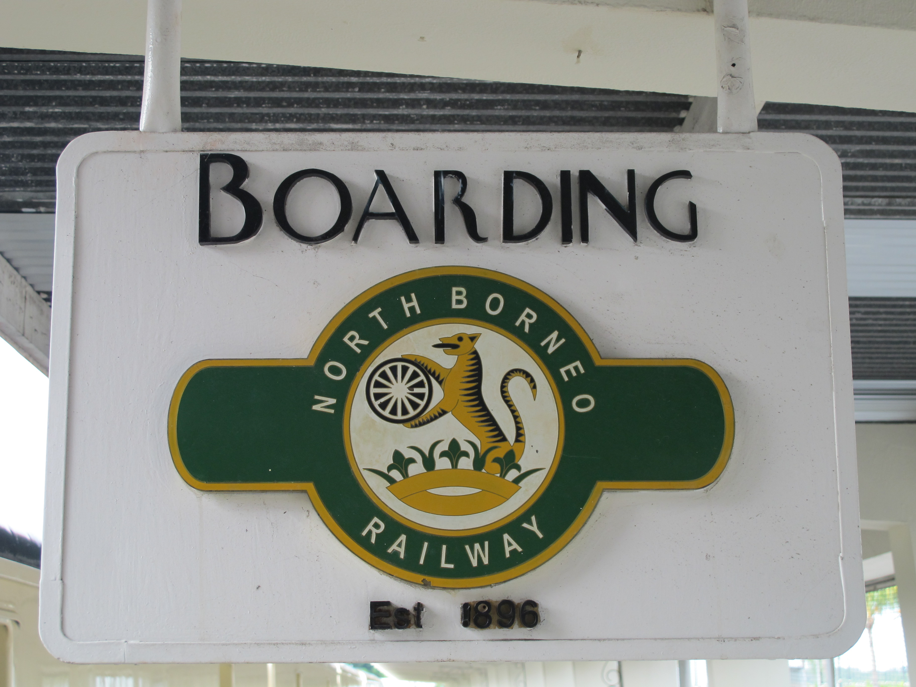 Nippon-Sharyo 1970 #2877